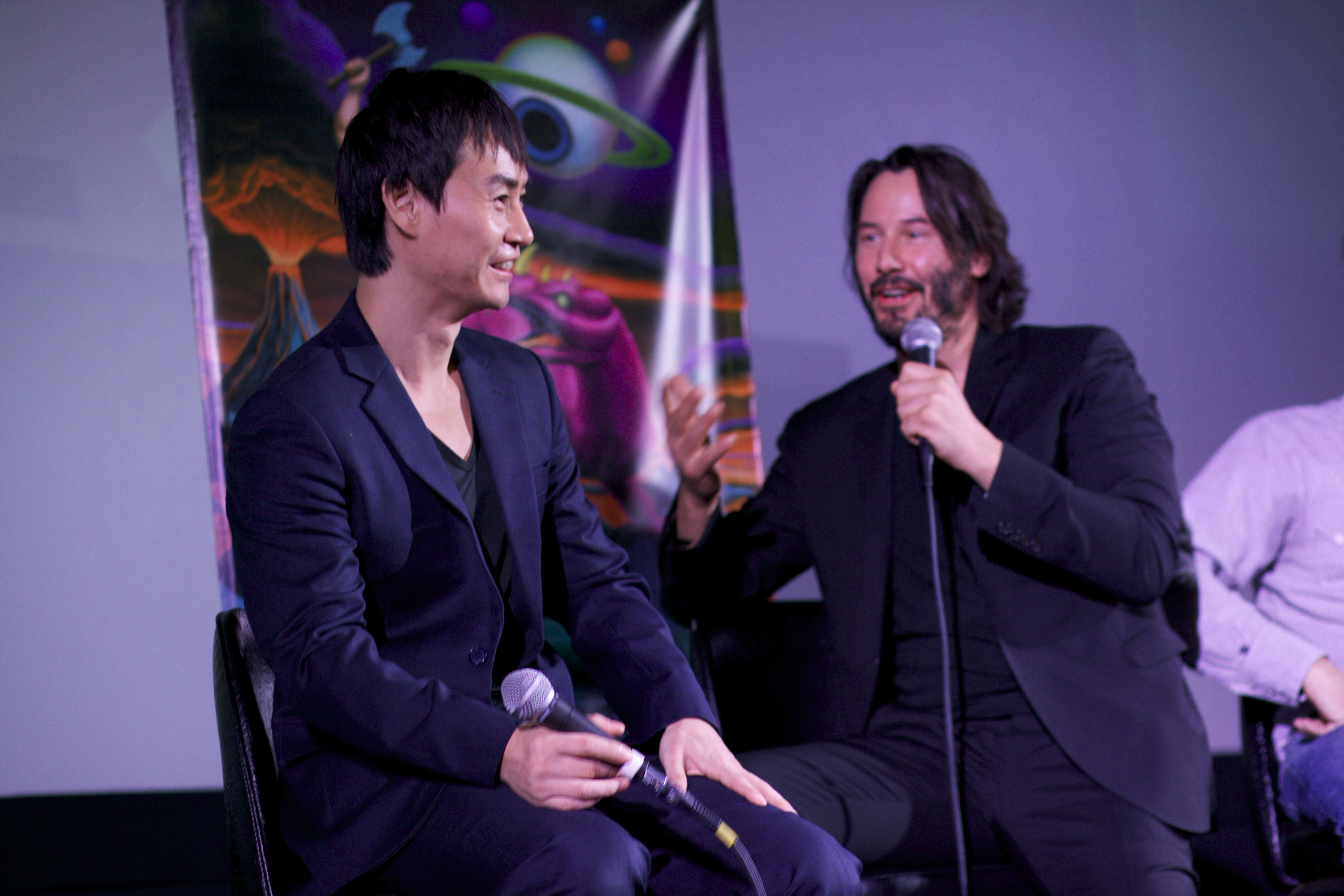 Keanu Reeves & Tiger Chen